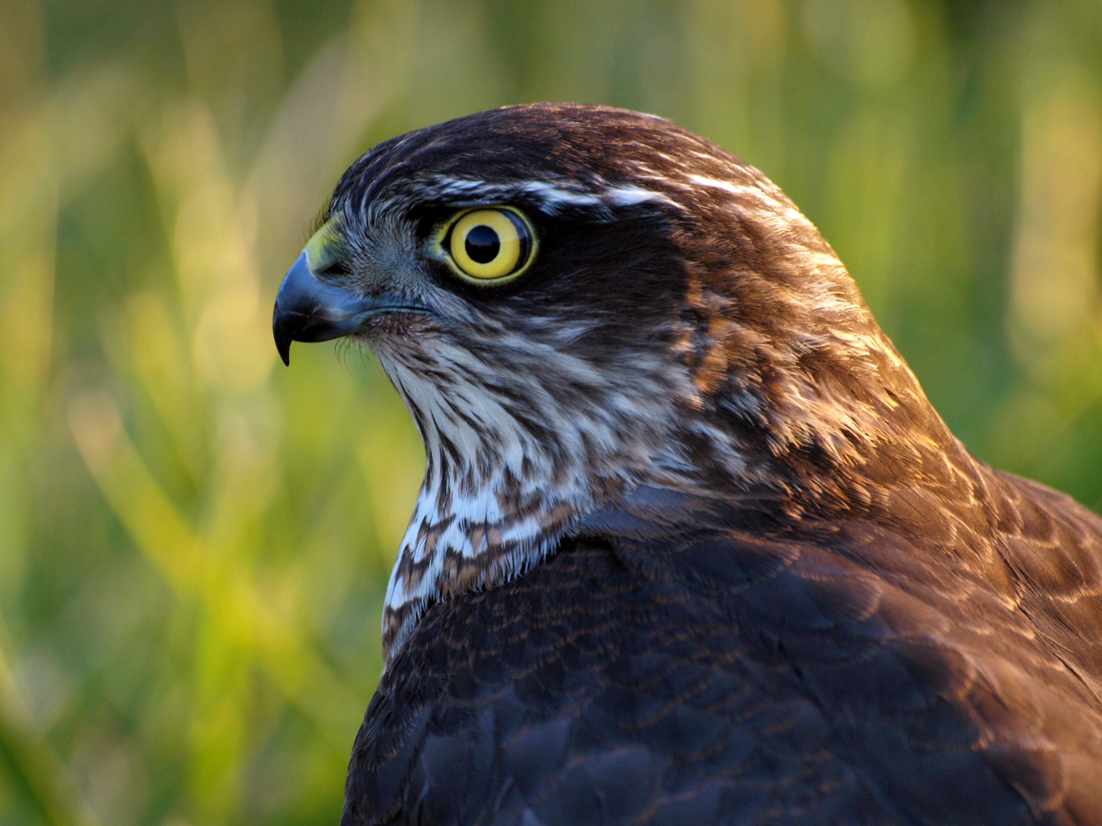 Krogulec zwyczajny - portret